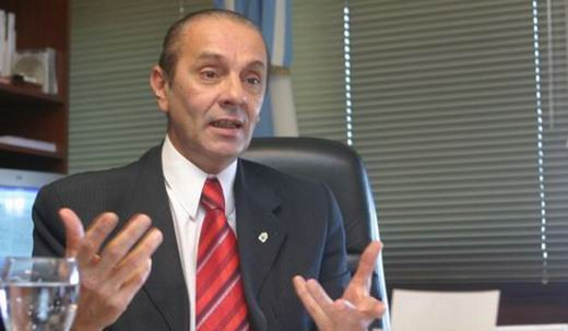 Luis Roberto Rueda